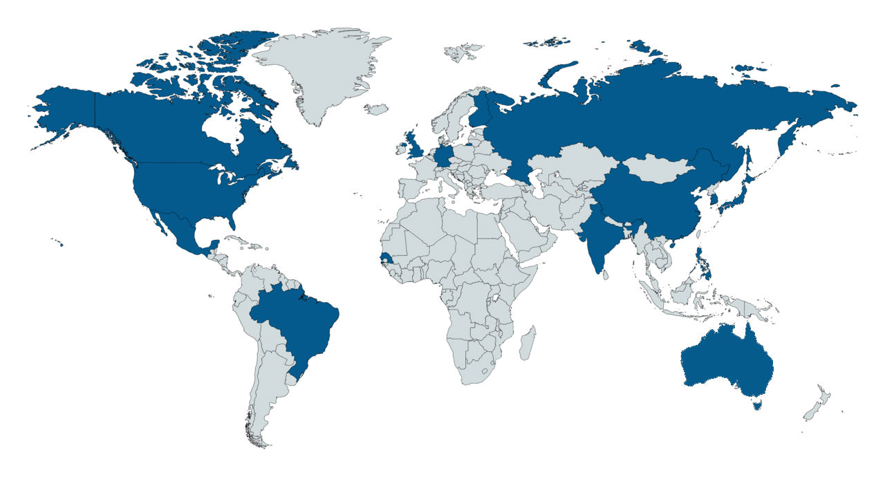 País Natal dos Integrantes do Now United